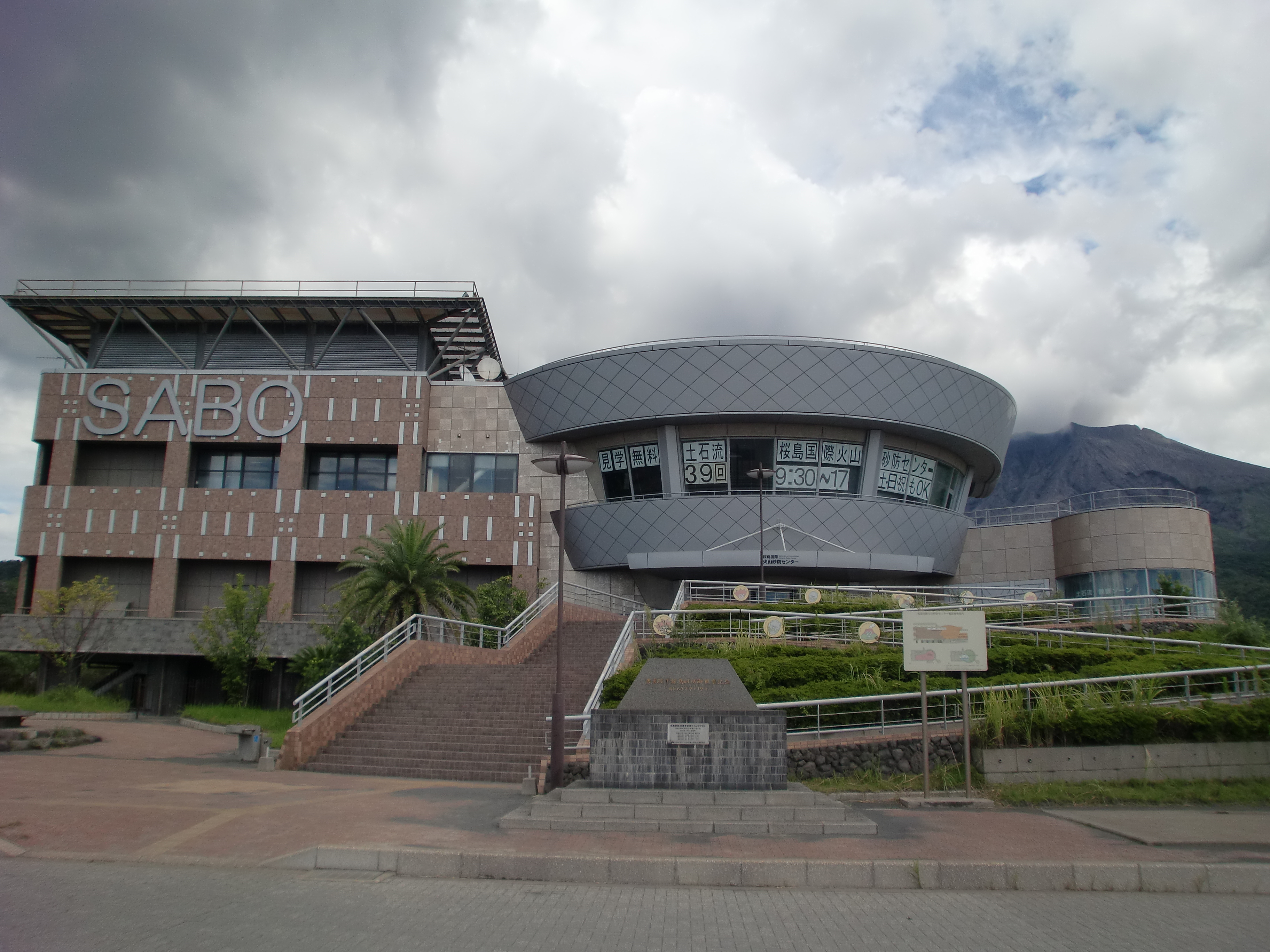 桜島国際火山砂防センターの外観。